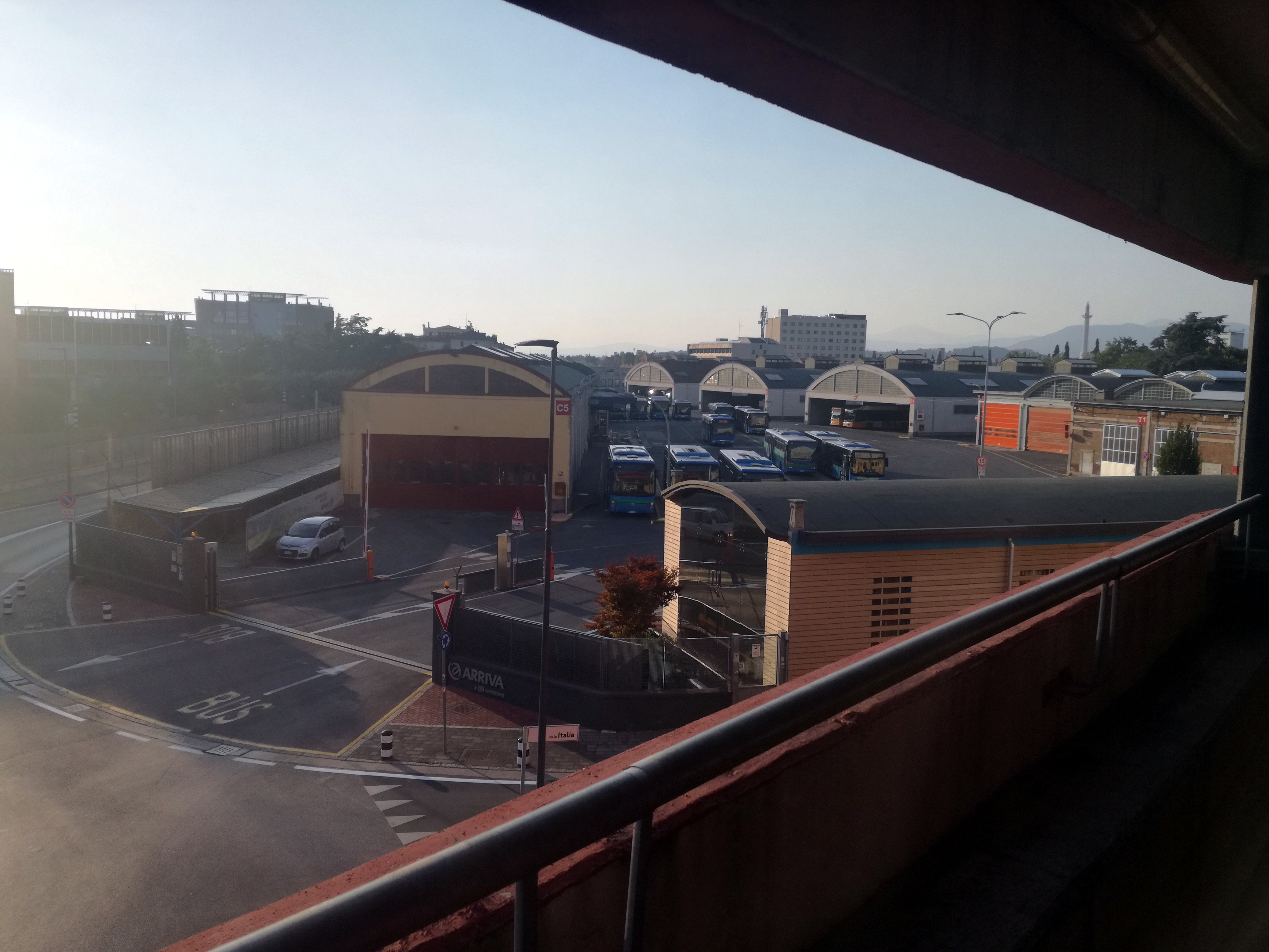 Deposito autobus SIA (Società Italiana Autoservizi) di via G.Togni a Brescia, Italia.